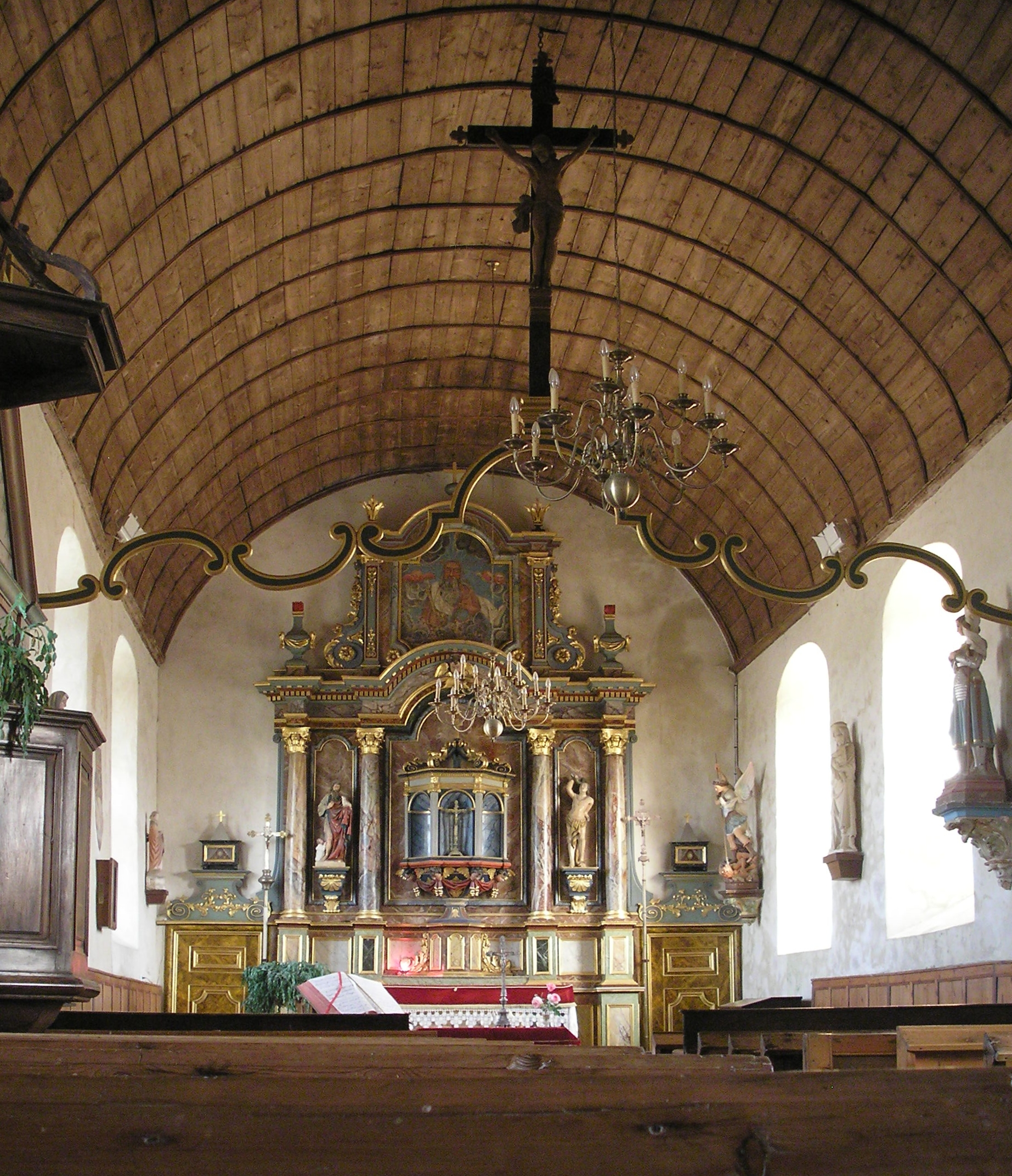 Servigny (Normandie, France). Vue intérieure de l'église Saint-Jean-Baptiste.